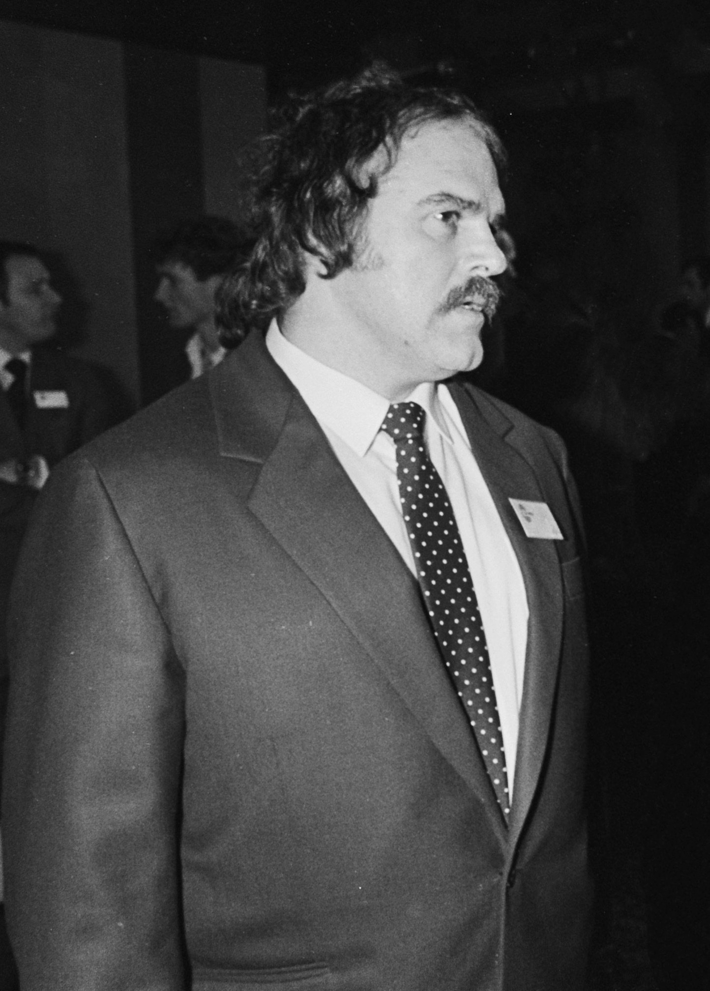 Staatssecretaris Wallis de Vries (CRM) in gesprek met de sterkste man van Nederland Gerard du Prie